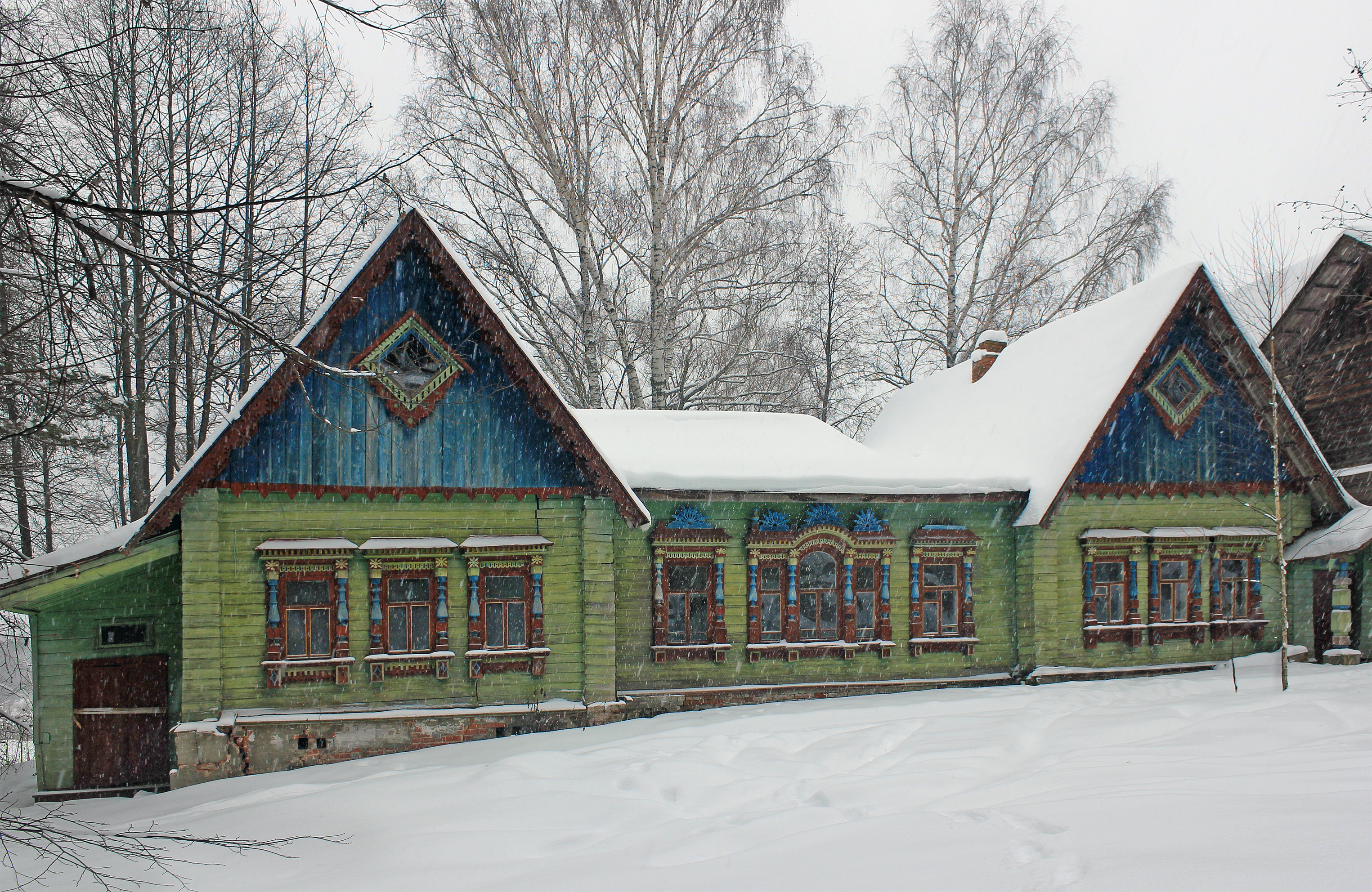 Усадьба Левашёвых в деревне Галибиха, Воскресенский район Нижегородской области.